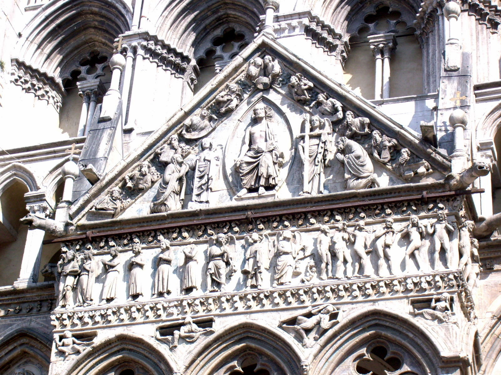 Ferarra, detall de la façana de la catedral